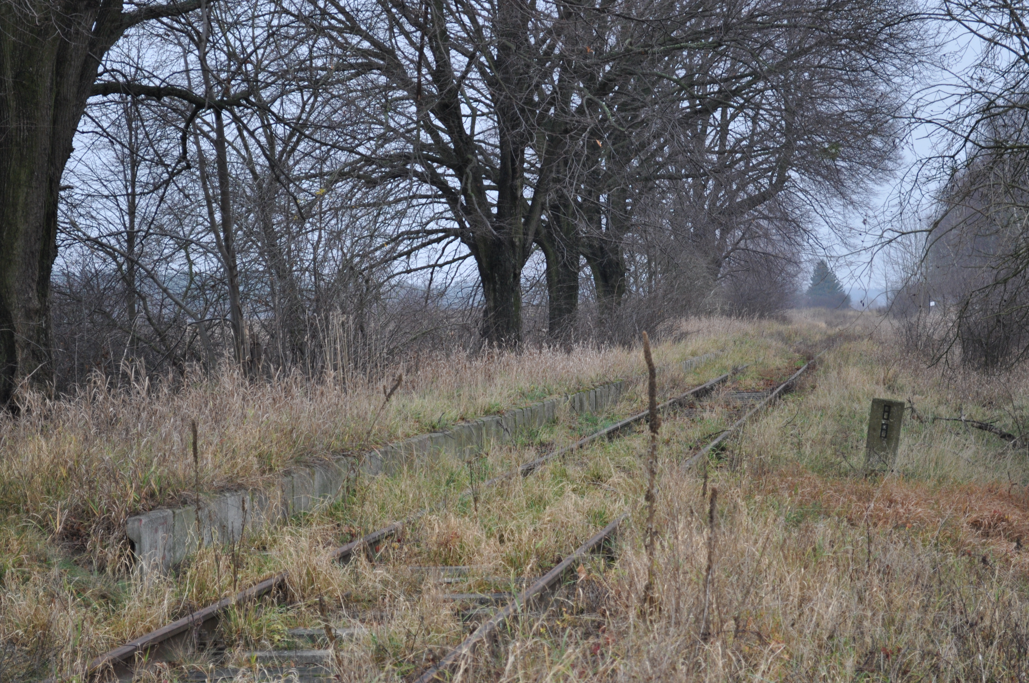 Przystanek Goszyn stan na 21-11-2010